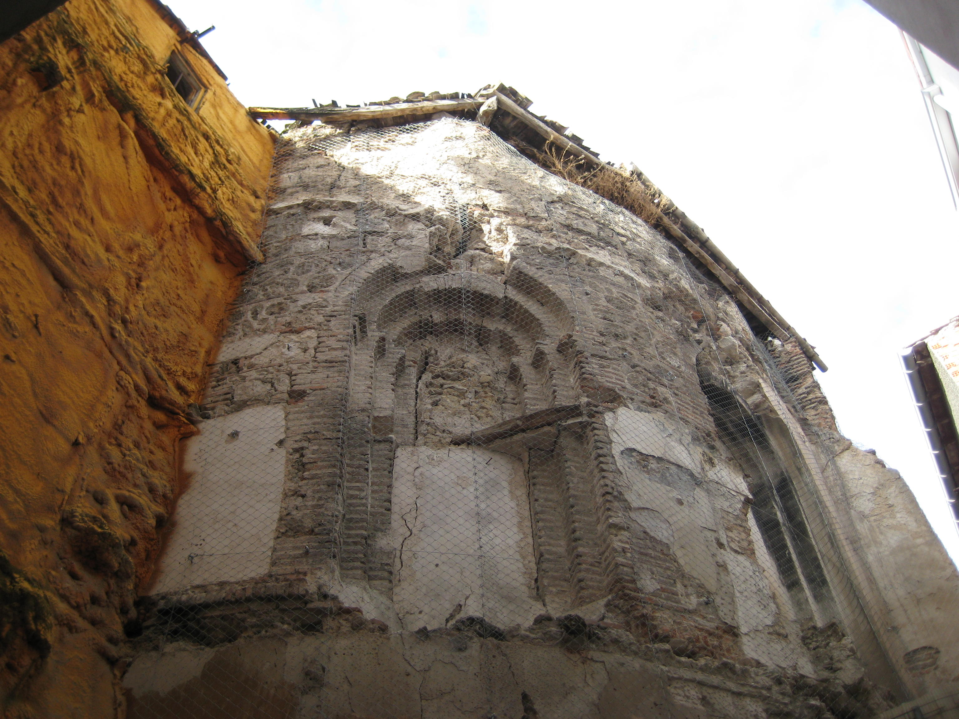 Esquina noreste de ábside